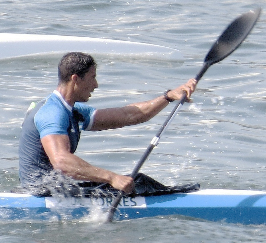 Sx50